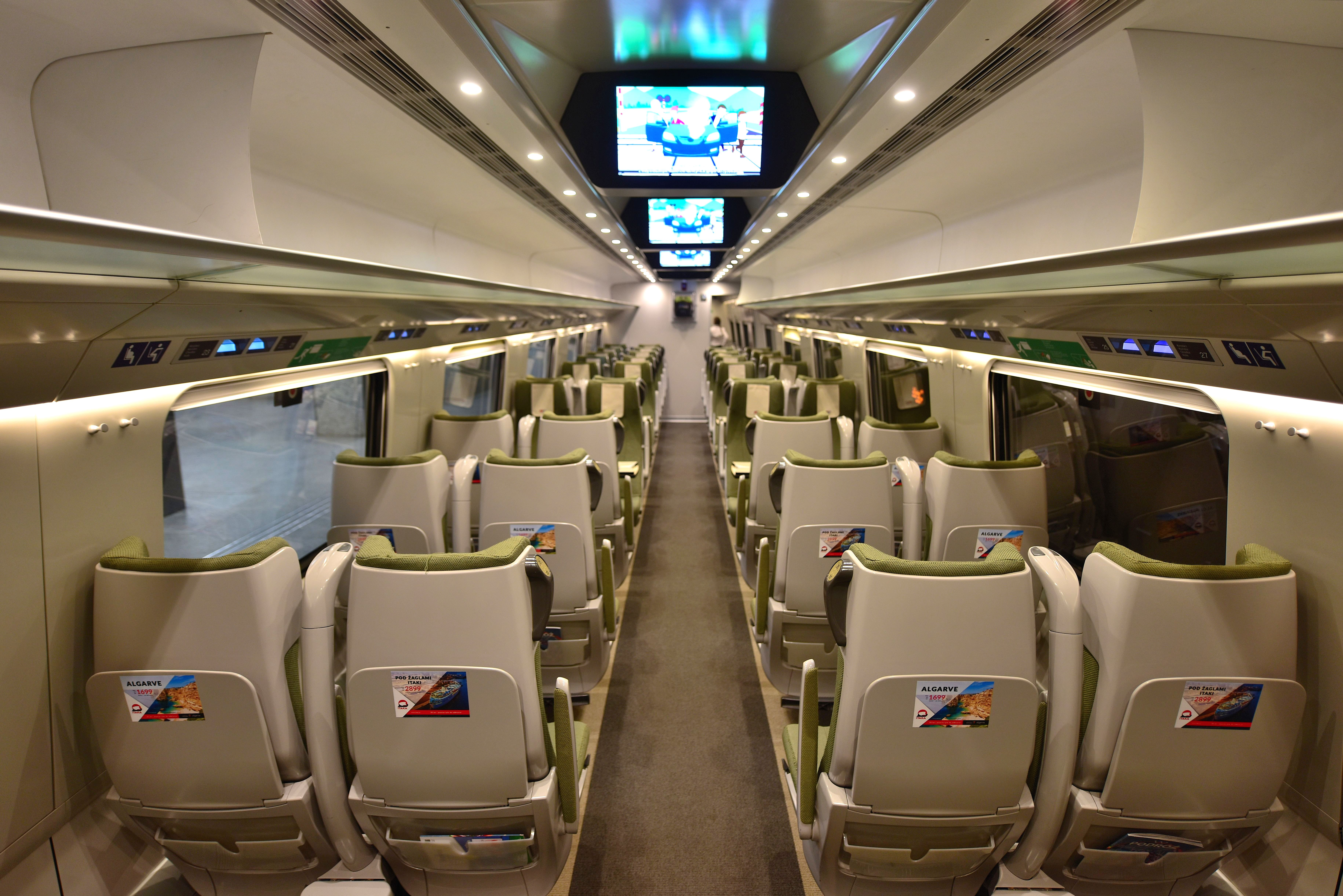 Pociąg Alstom EMU250 relacji Wrocław Główny-Warszawa Wschodnia, wnętrze wagonu 2 klasy